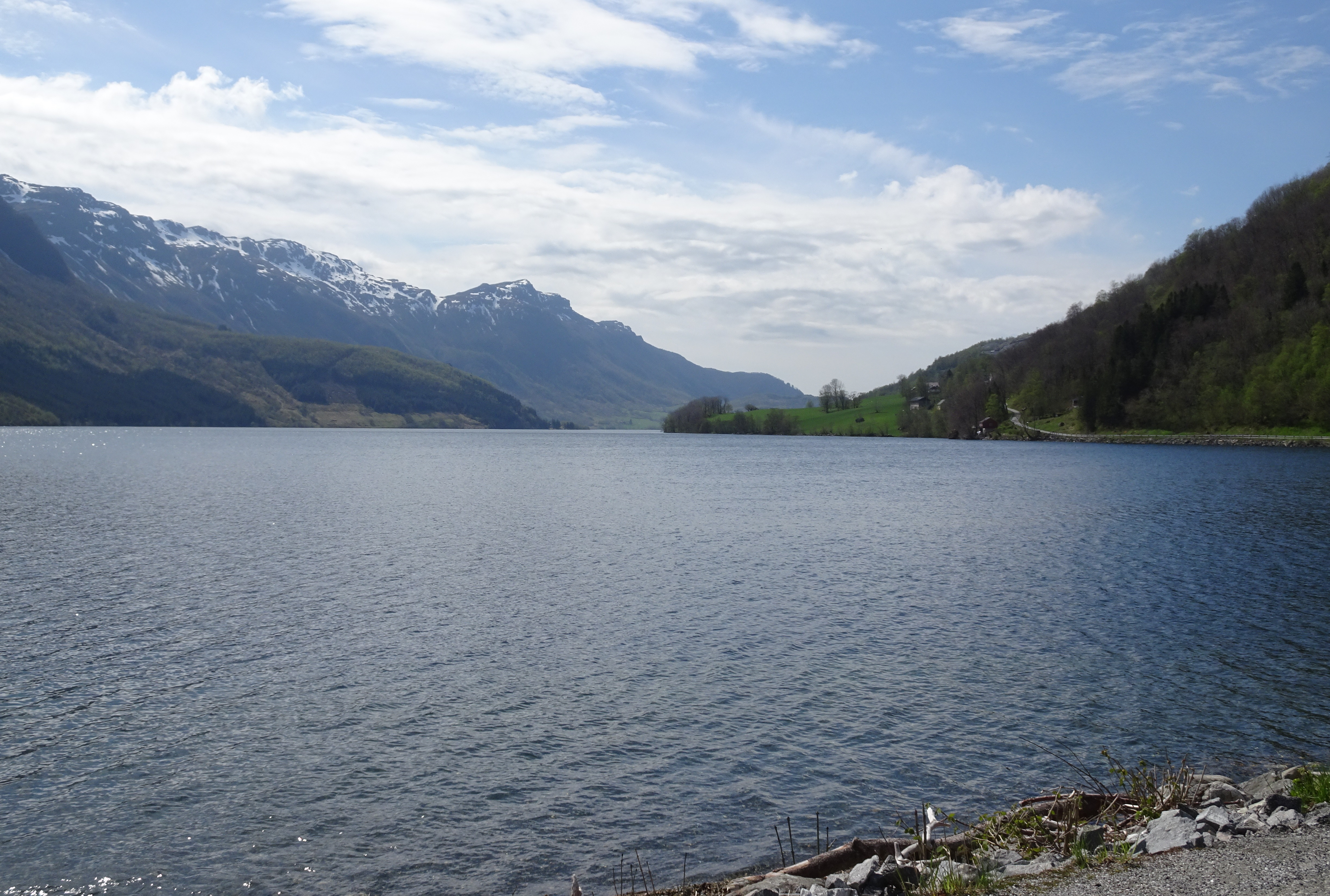 Stordalsvatnet i Etne i Hordaland